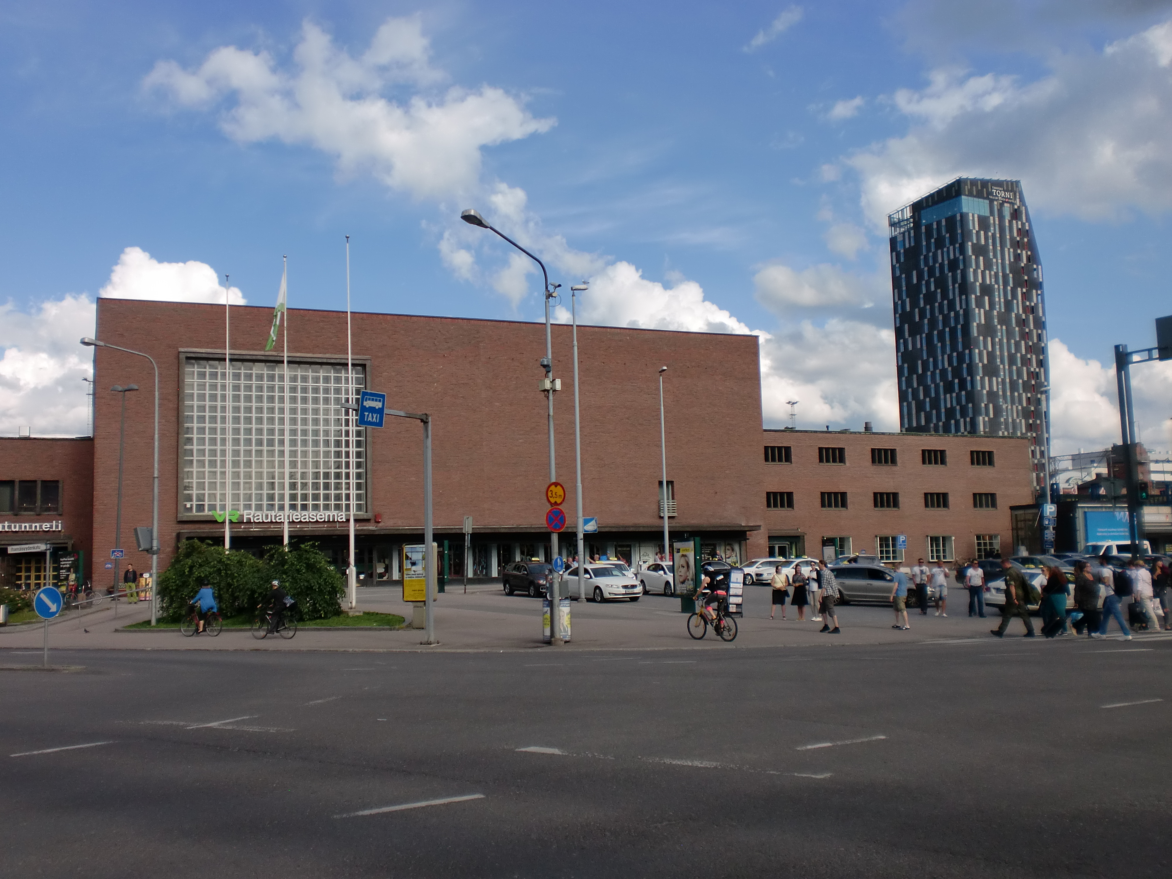 Tampereen rautatieasema; railway station in Tampere, Finland